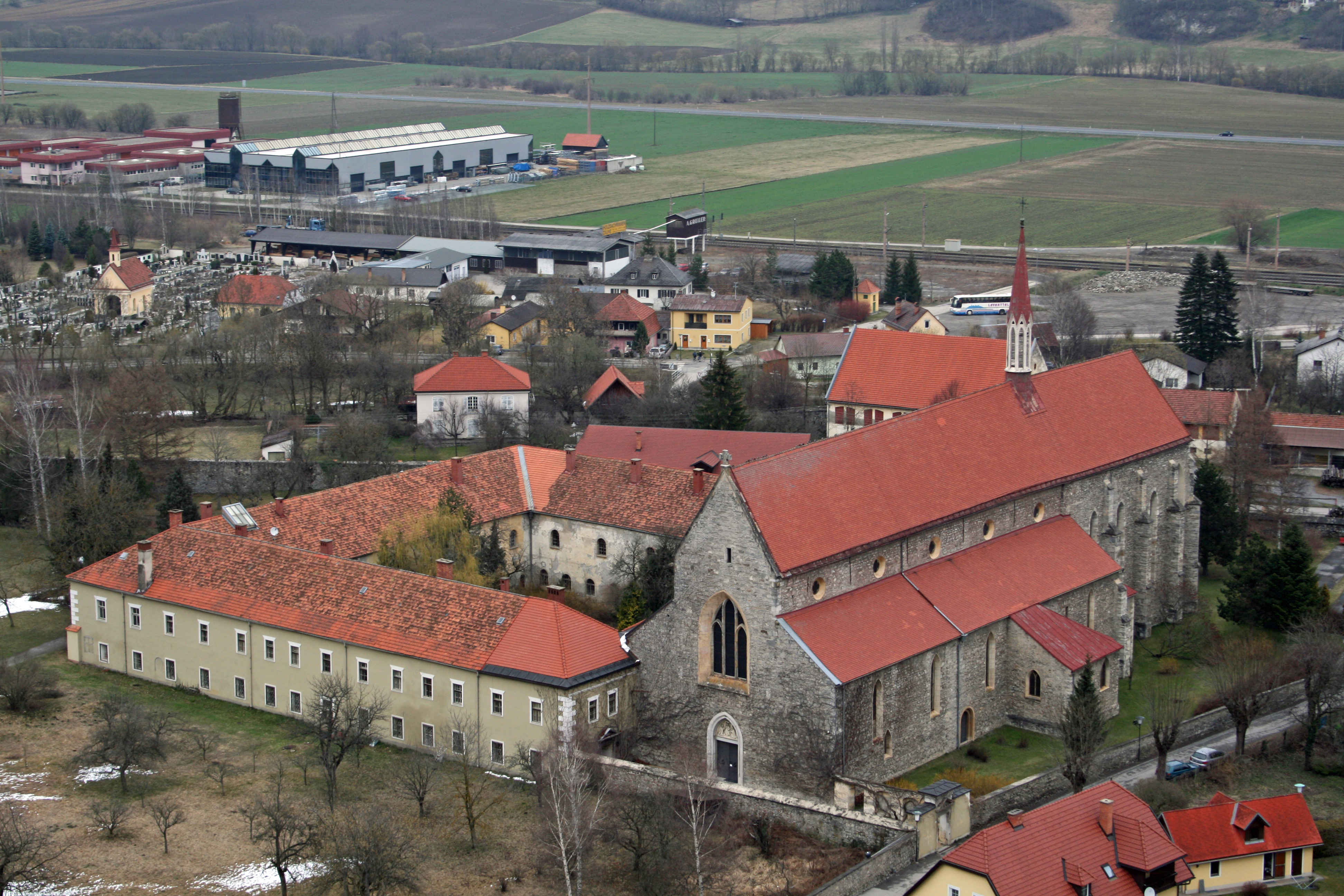 Dominikanerkirche und Dominikanerkloster, Friesach, Kärnten, Österreich; von der Burg aus gesehen